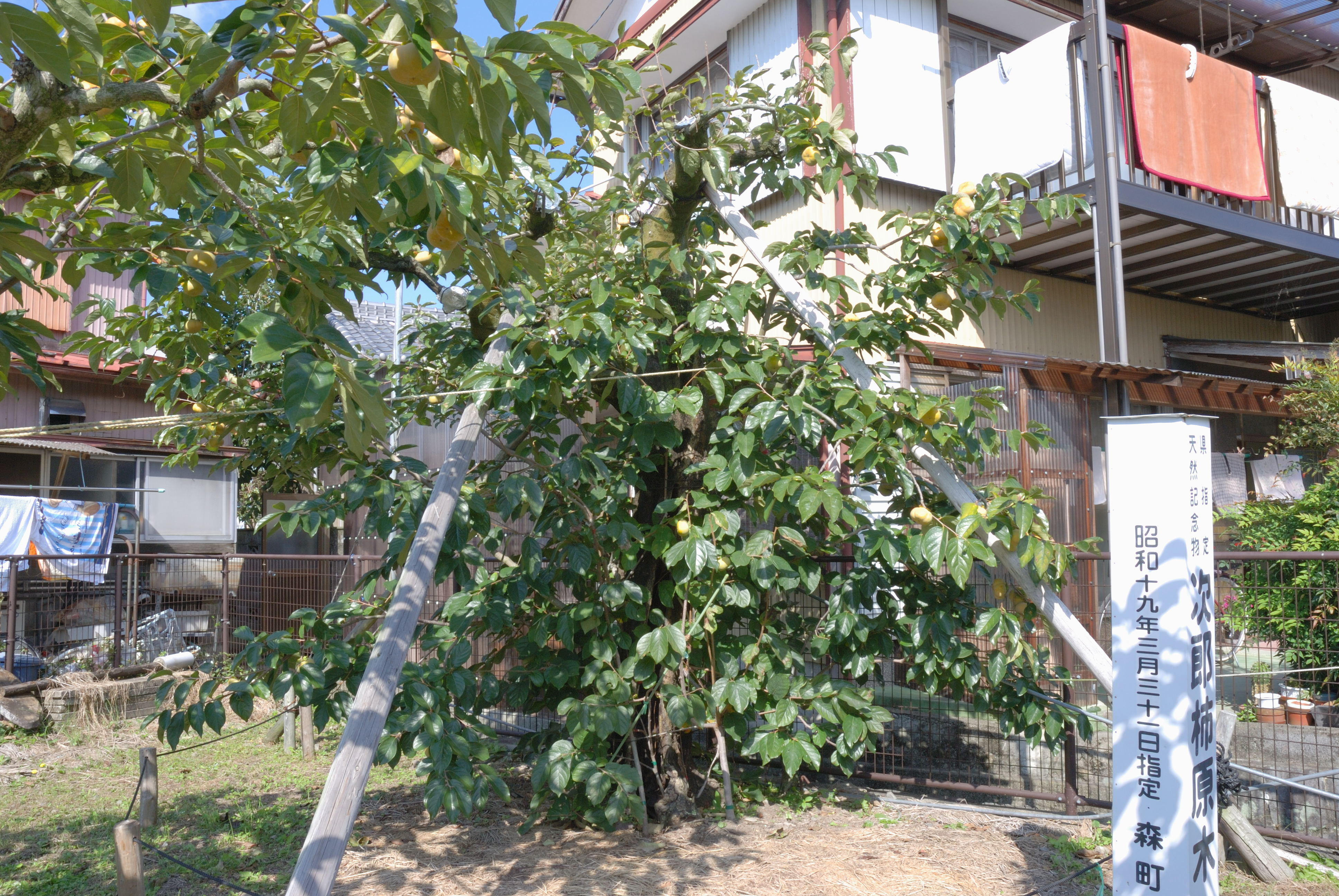 Jiro genboku